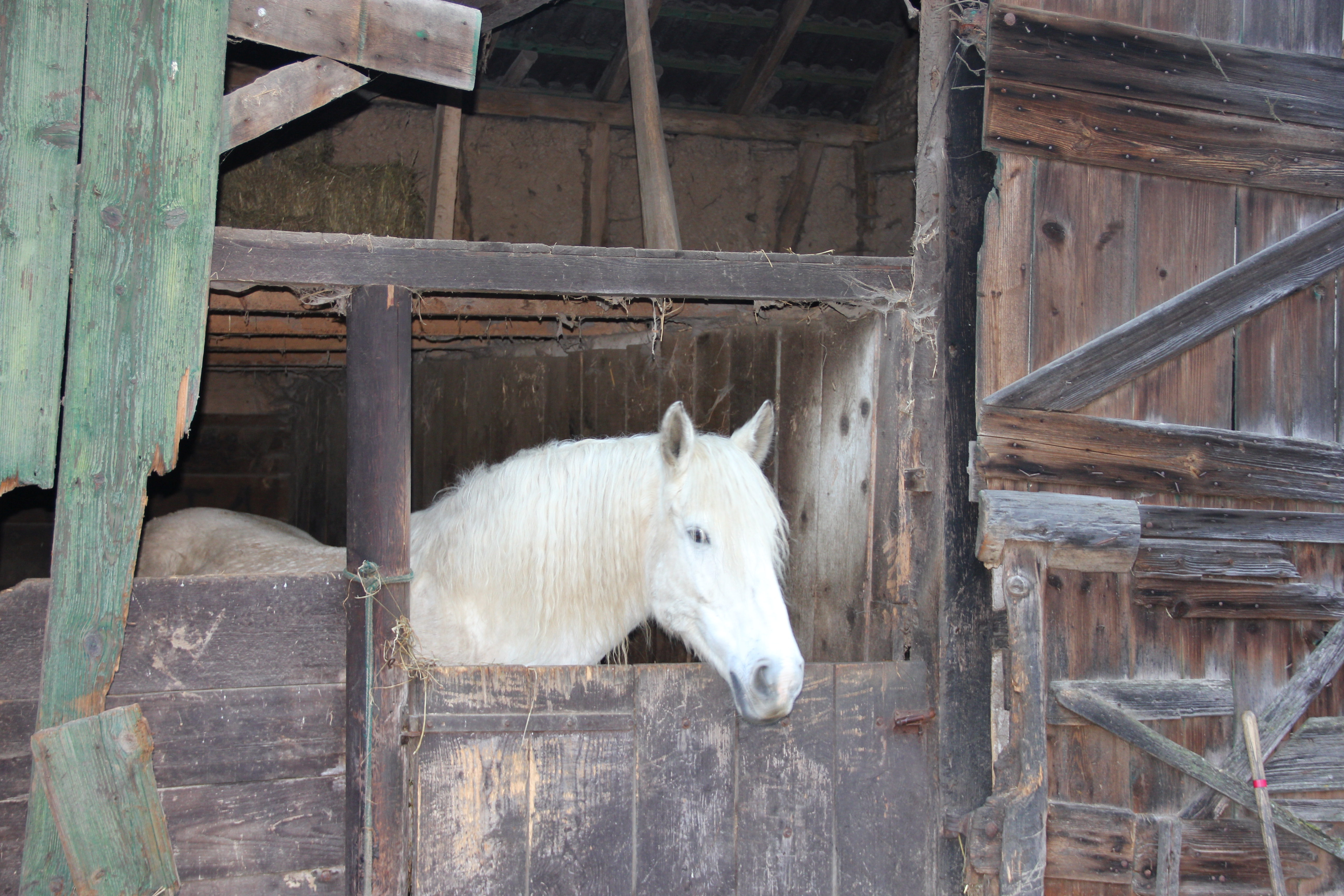 Pferd im Stall in der Gammersbacher Mühle, Stadt Lohmar